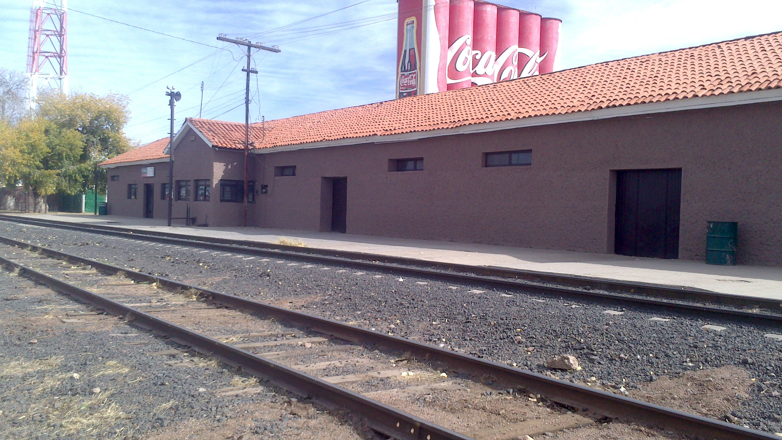 La estación de tren del Chepe en Cuauhtémoc, al parecer la construcción mas vieja de toda la ciudad, con los silos de la Coca al fondo.